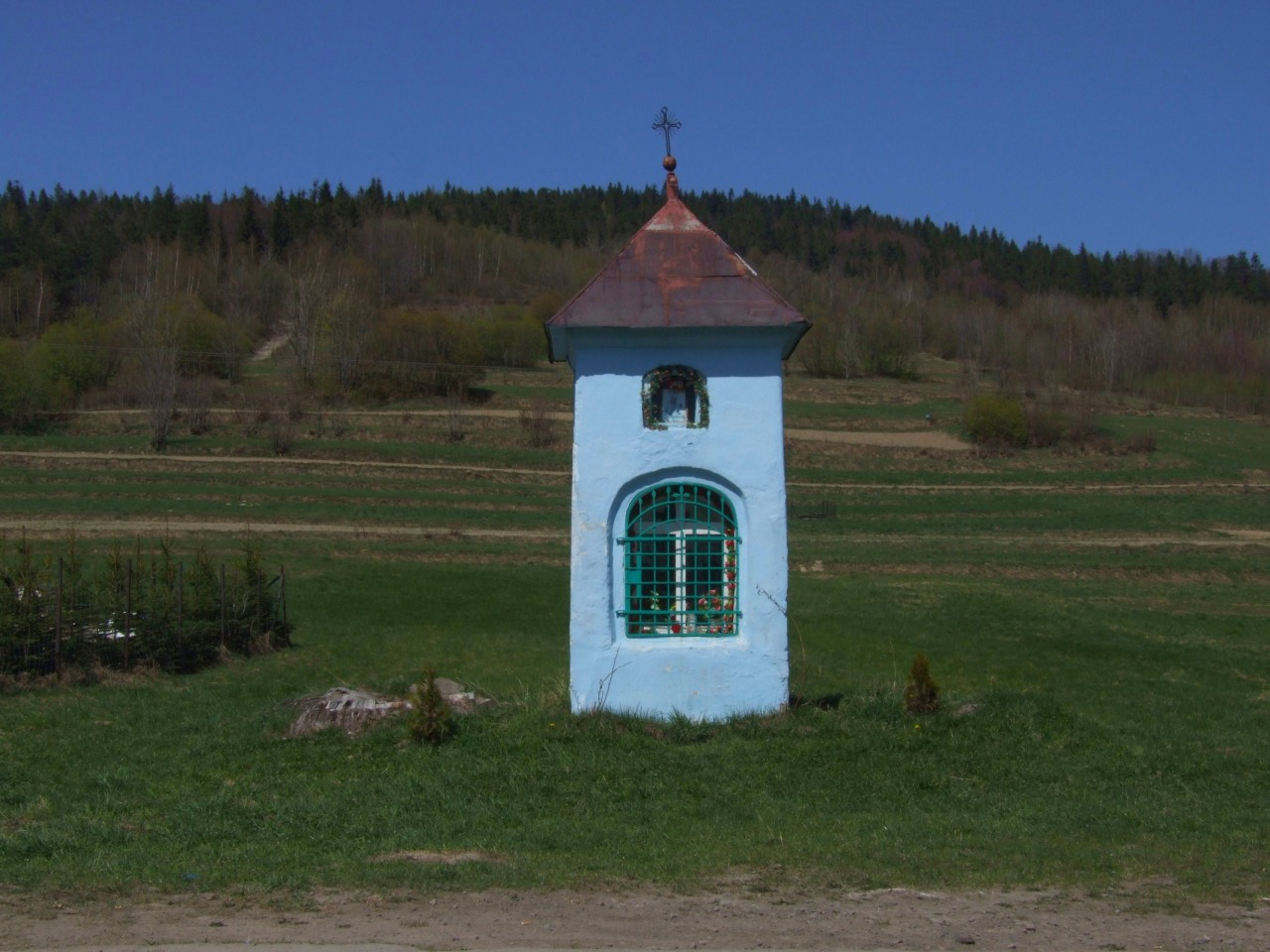 Kapliczka na przełęczy Gruszowiec w Beskidzie Wyspowym